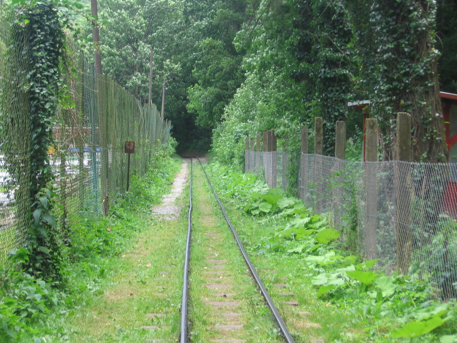 LÁEV pálya a pisztrángkeltetőnél. Érdekes módon itt nincsen megállóhely.